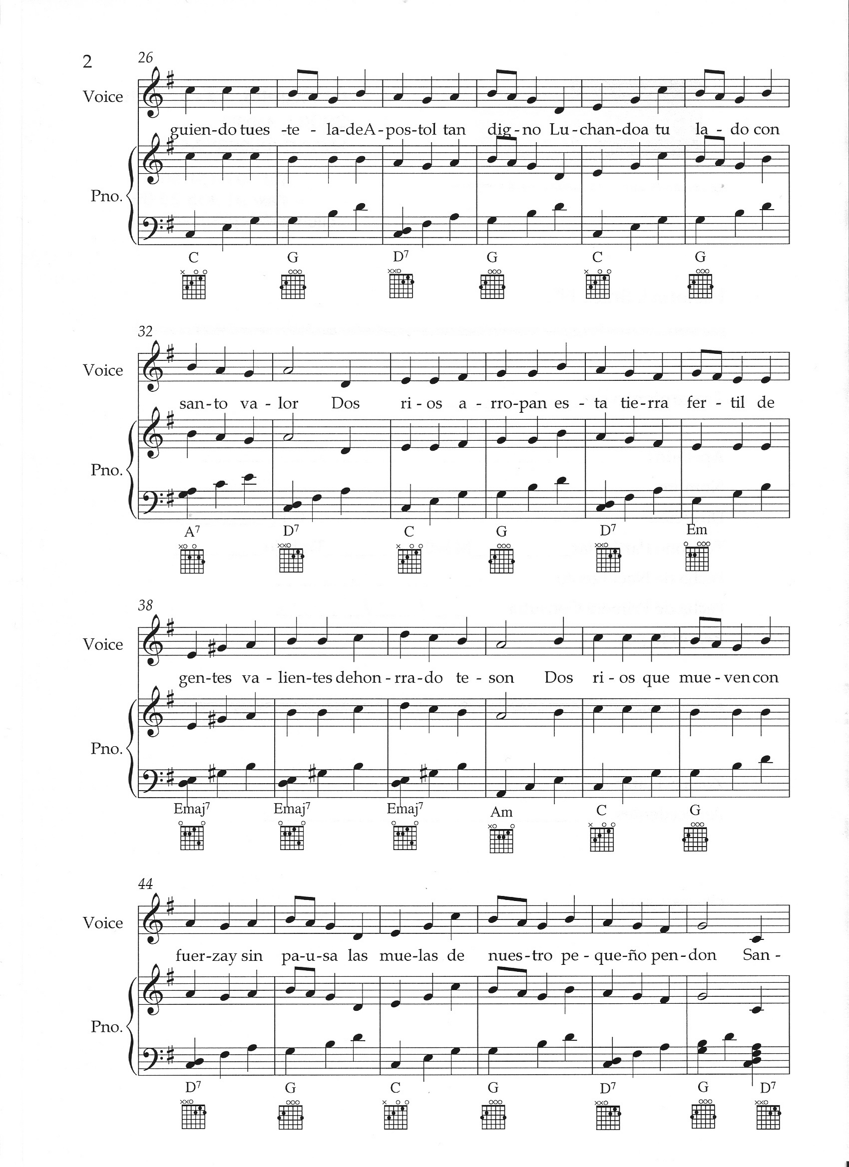 Hoja segunda de la partitura elemental del Himno Santiago del Molinillo, en el municipio de Las Omañas (León, España) para voz y piano.